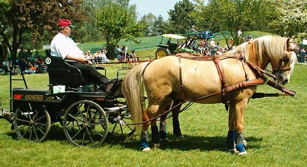 Haflingergespann mit Marathonwagen